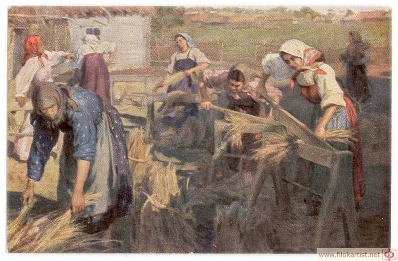 «Ф. В. Сычков. Трепание льна. Дореволюционная открытка.»label QS:Lru,"Ф. В. Сычков. Трепание льна. Дореволюционная открытка."